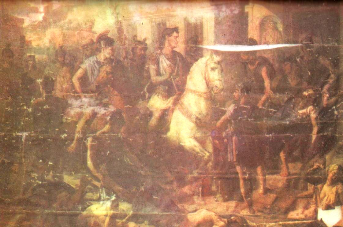 Intrarea triumfală a lui Traian în Sarmizegetusa de la Mănăstirea Căldărușani